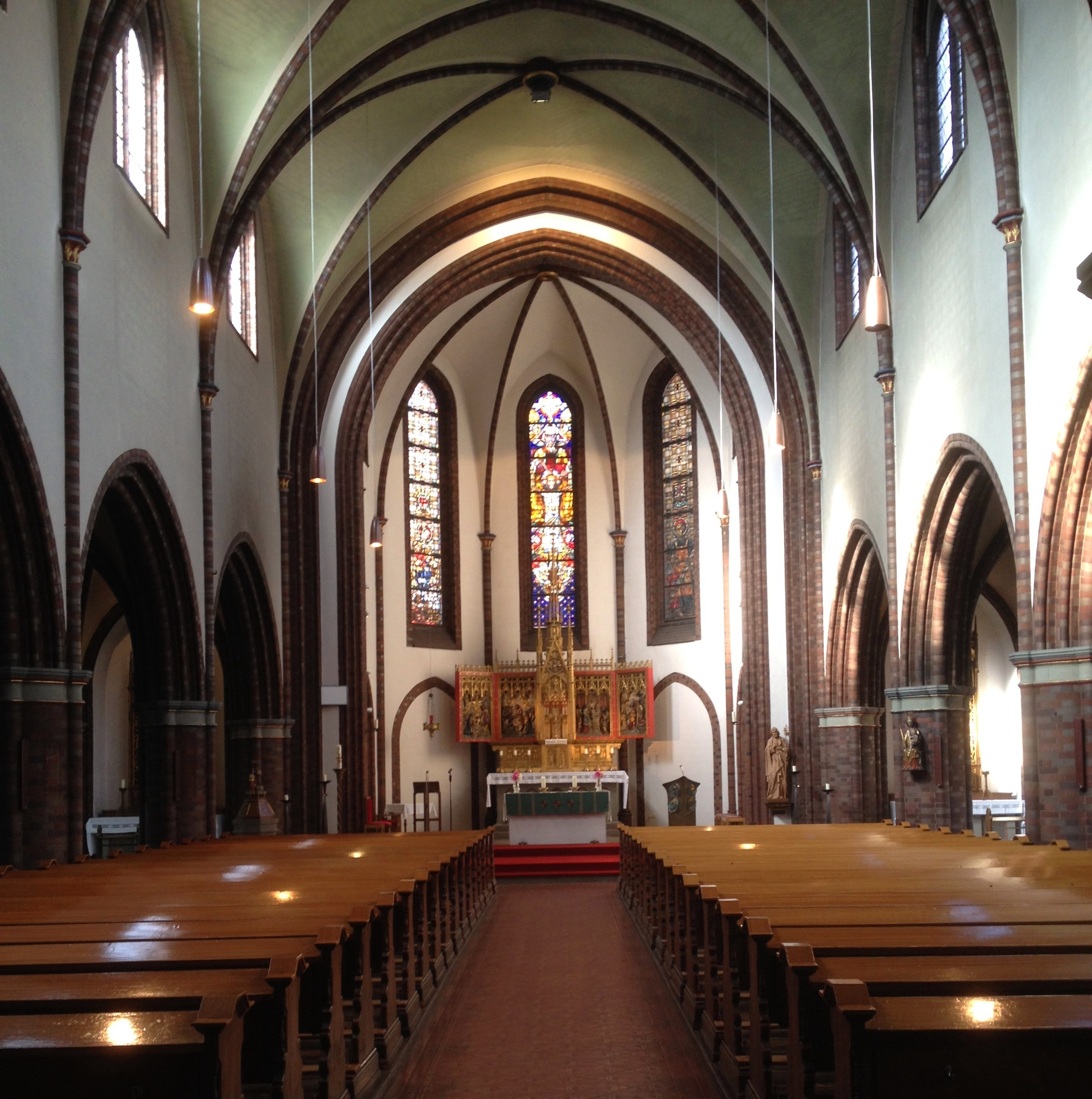 Braunschweig, kath. Kirche St. Josef